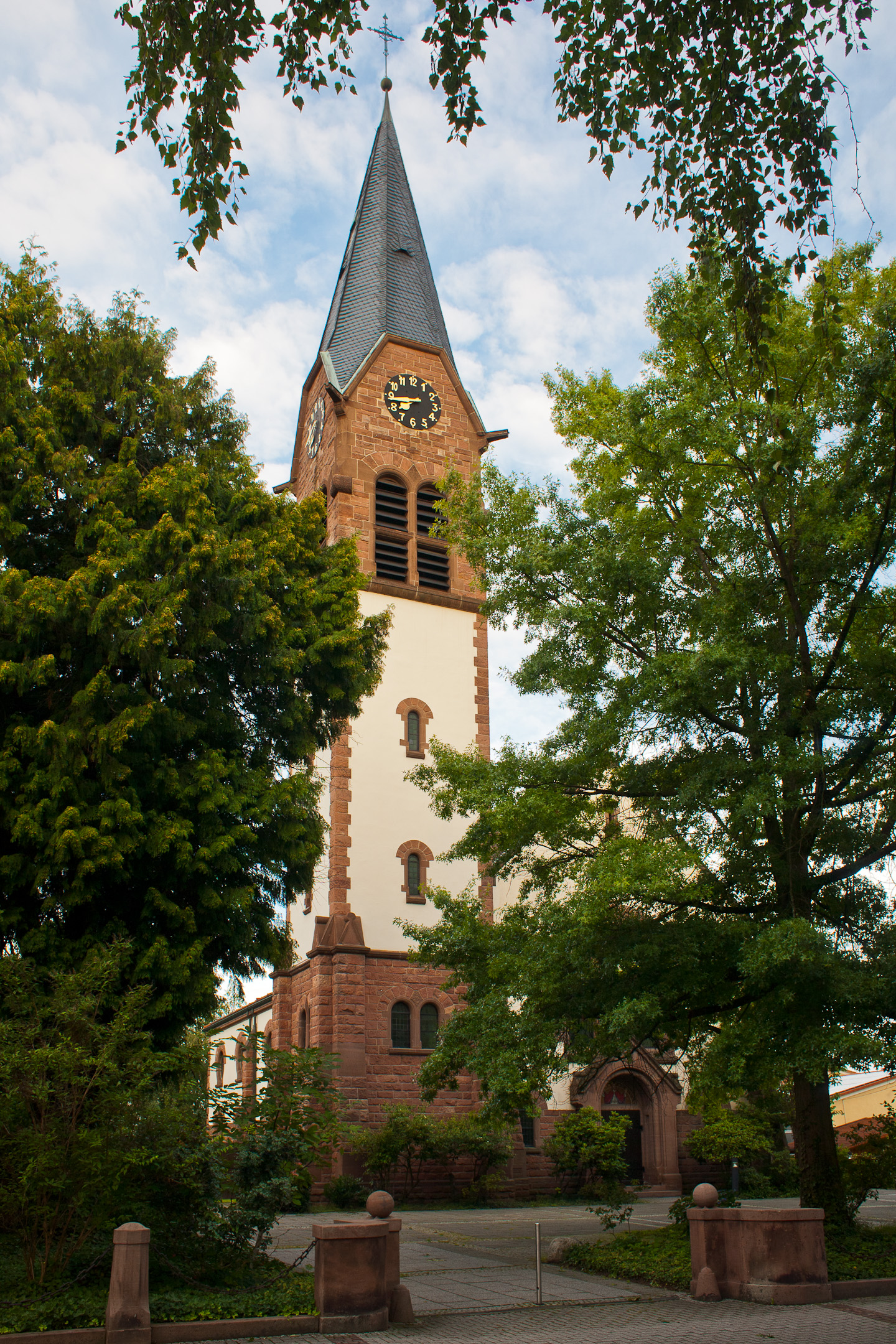 Evangelische Christuskirche Achern